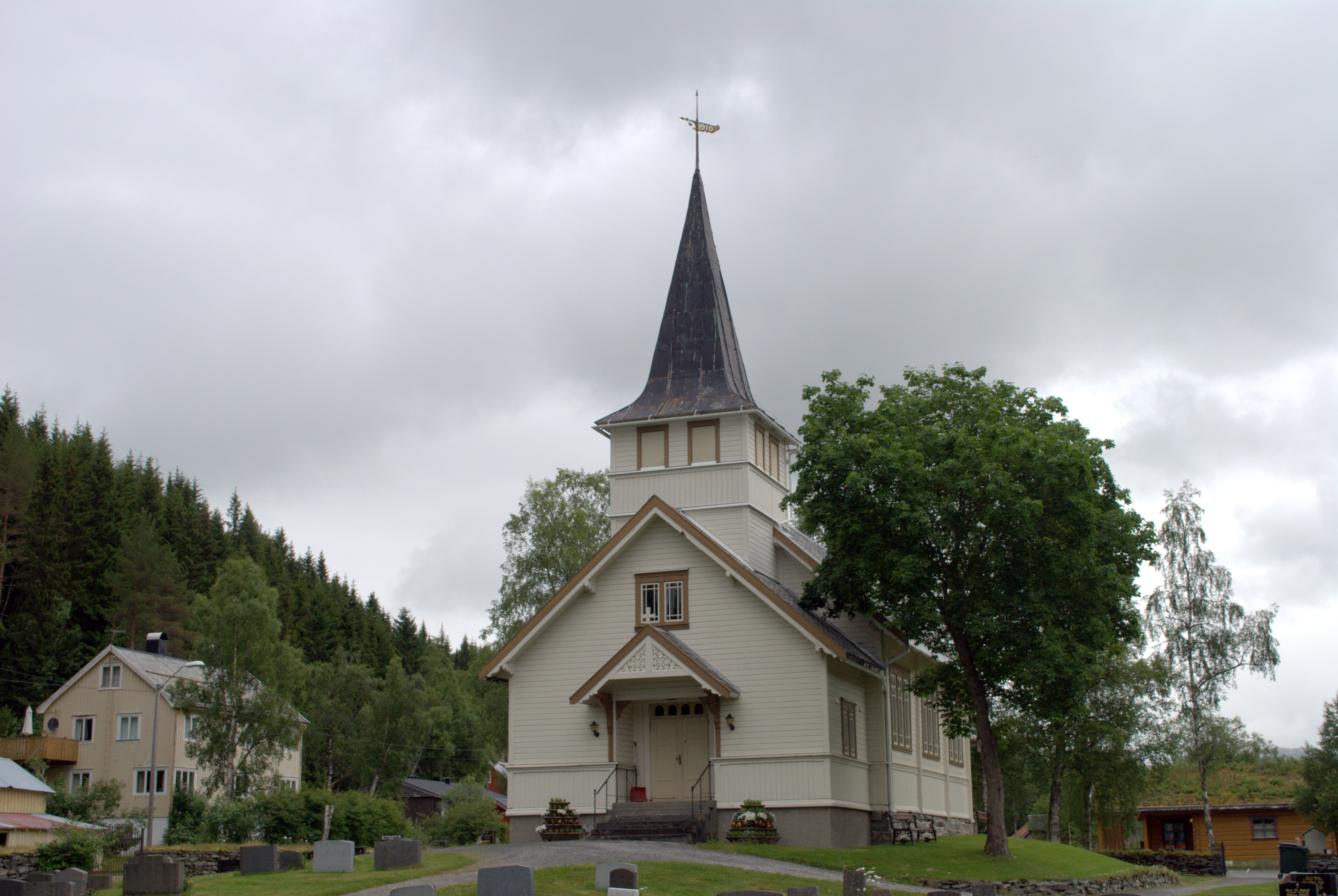 Øvre Rindal kapell / kirke i Rindal, Møre og Romsdal.